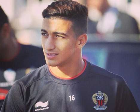 l'algerien au nice